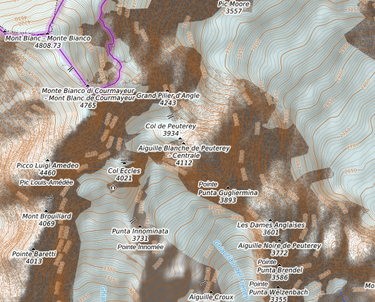 carte réalisée sur umap This map may be incomplete, and may contain errors. Don't rely solely on it for navigation.